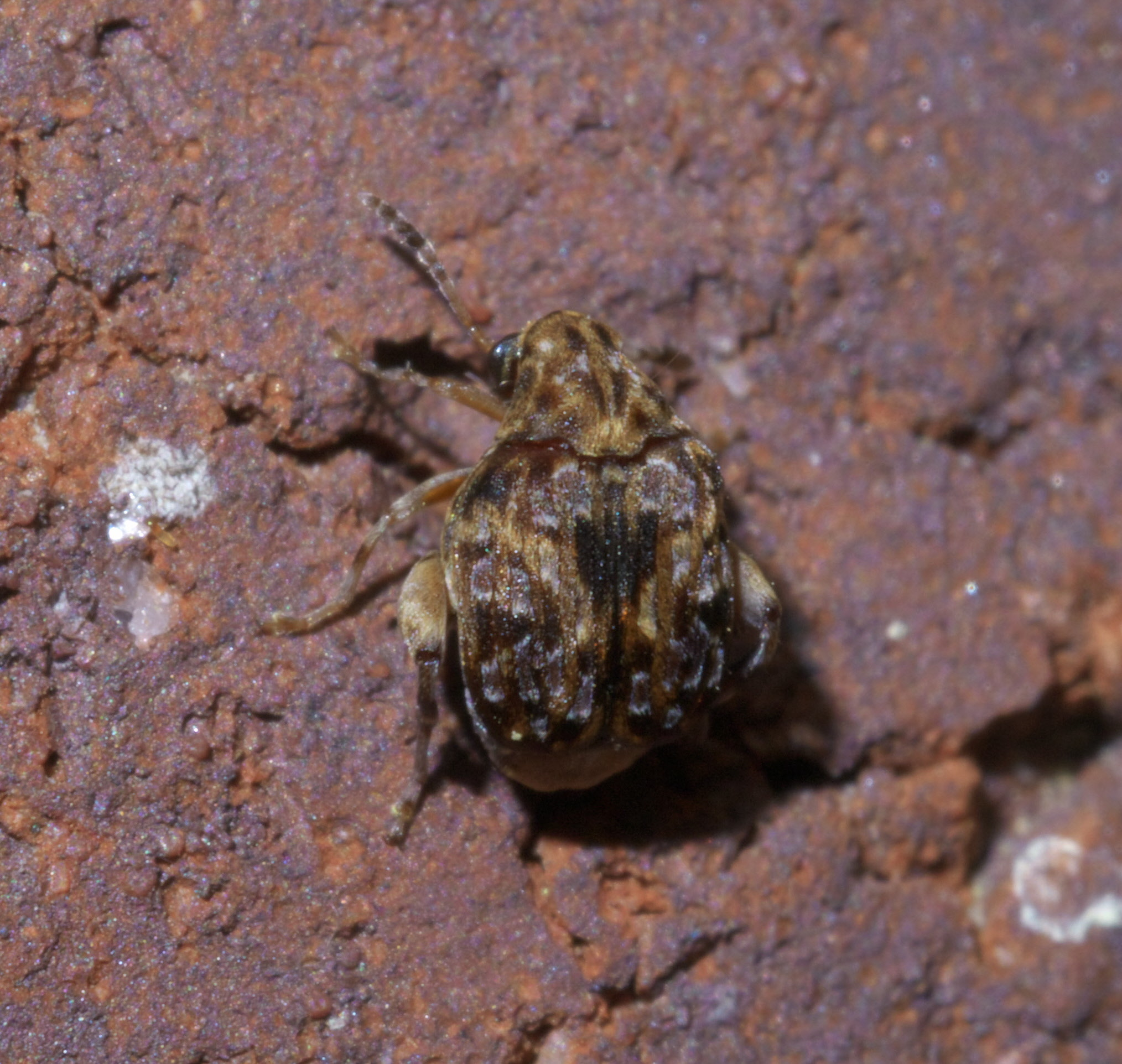 Gibbobruchus mimus, Redbud Bruchid, Size: 3.2 mm, ID Confidence: 92